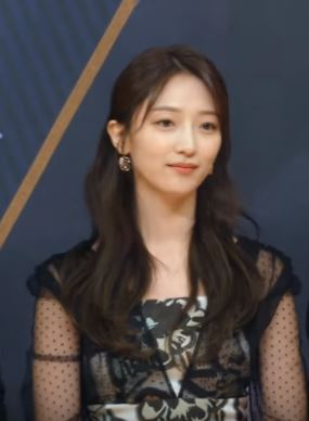 25일 오후 서울시 양천구 목동 SBS에서 새 월화드라마 'VIP'의 제작발표회가 열려 이정림 PD와 배우들이 참석해 단체 포토타임을 갖고 있다.